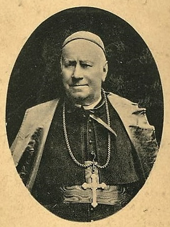 Photographie faisant partie d'un faire-part de décès, 1896